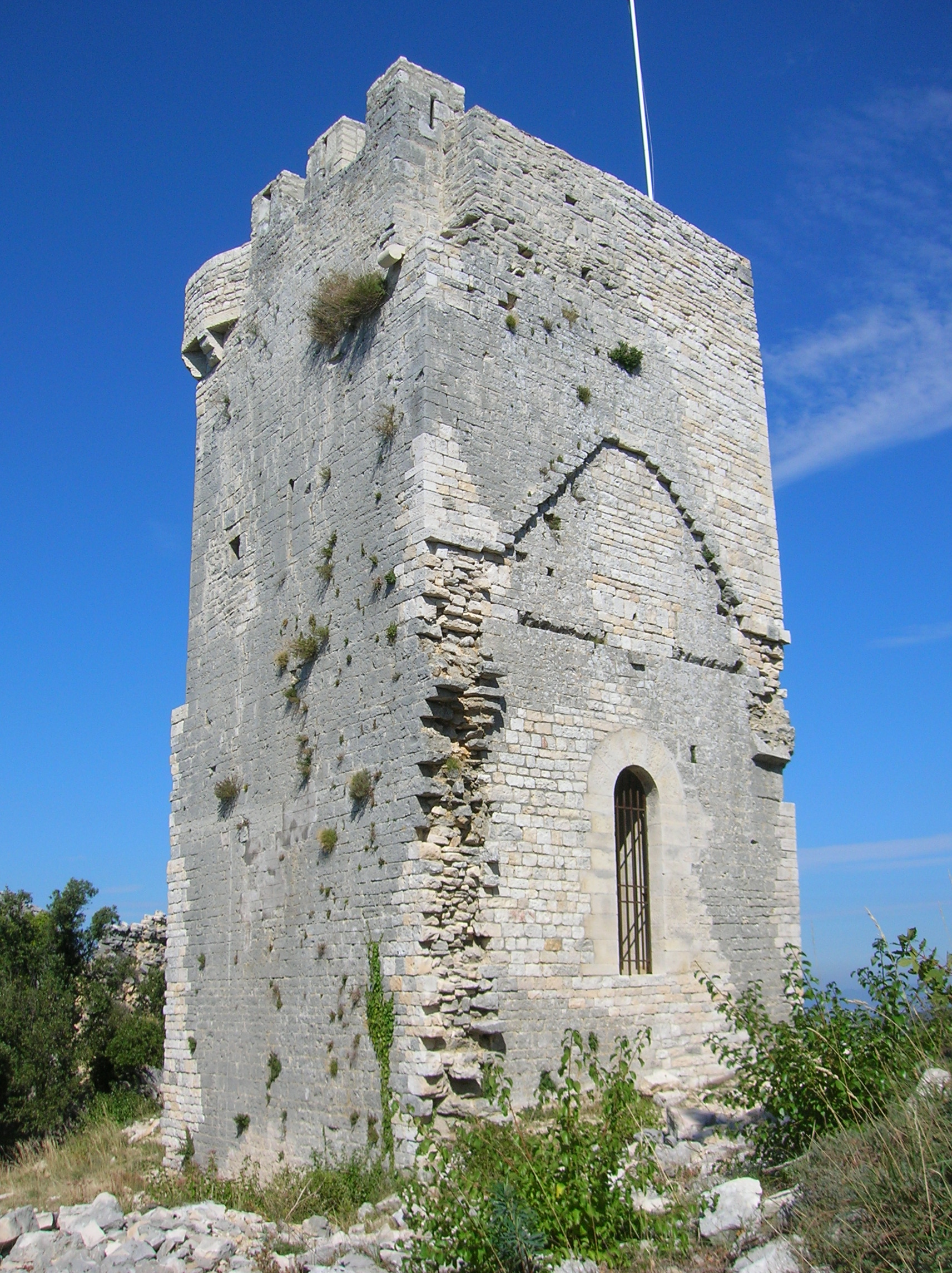 Castellas du Bouquet. Gard, Languedoc-Roussillon-Midi-Pyrénées, France.